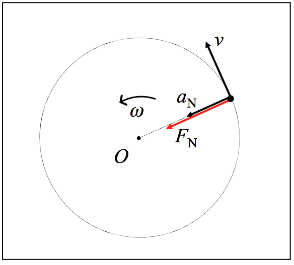 Higidura zirkular uniformeko abiadura, azelerazio zentripetua eta indar zentripetua.